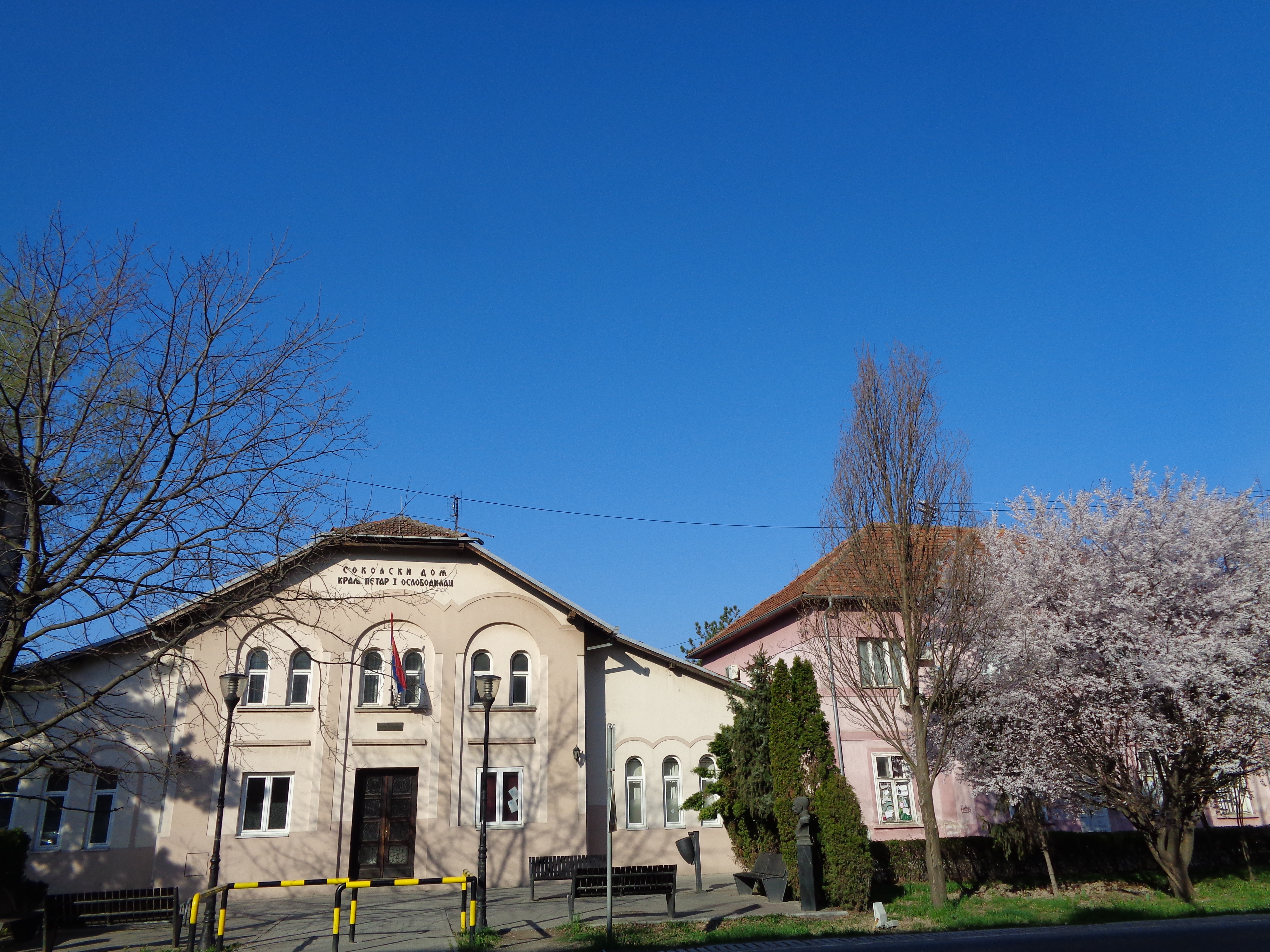 Srpskohrvatski / српскохрватски: Stara Pazova, Sokolski dom